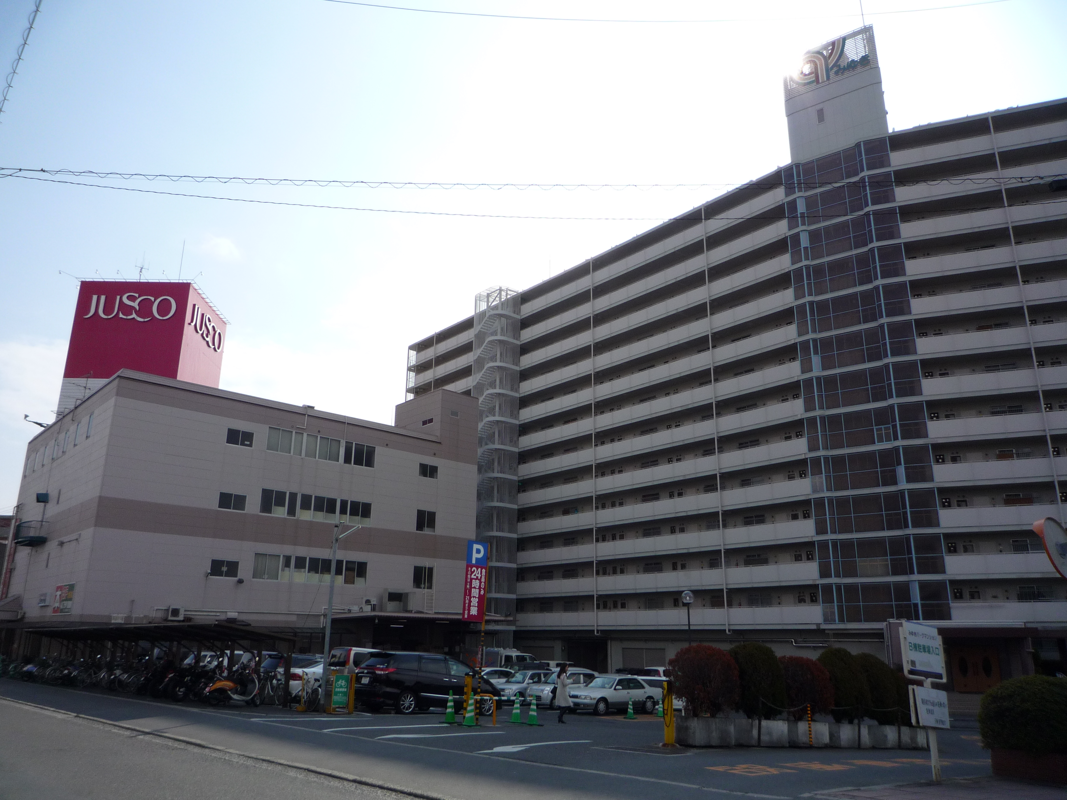 みゆきパークマンション・ジャスコみゆき店